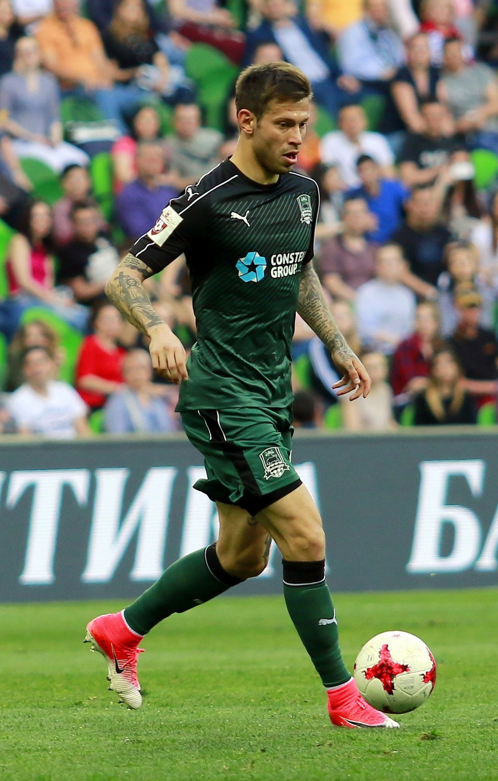 «Краснодар» - «Анжи»